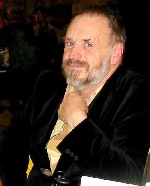 Pierre Duc